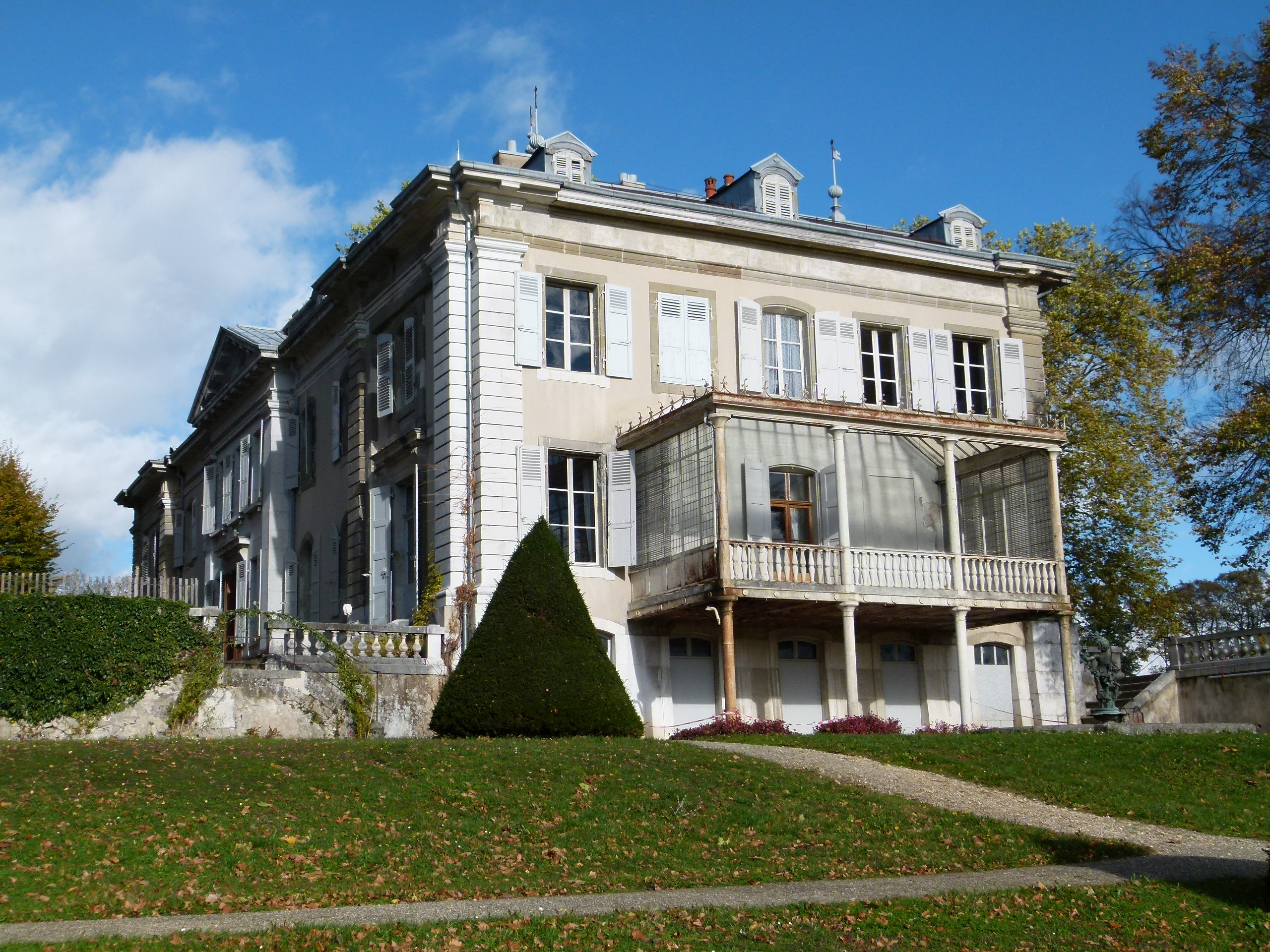 Château de Voltaire à Ferney